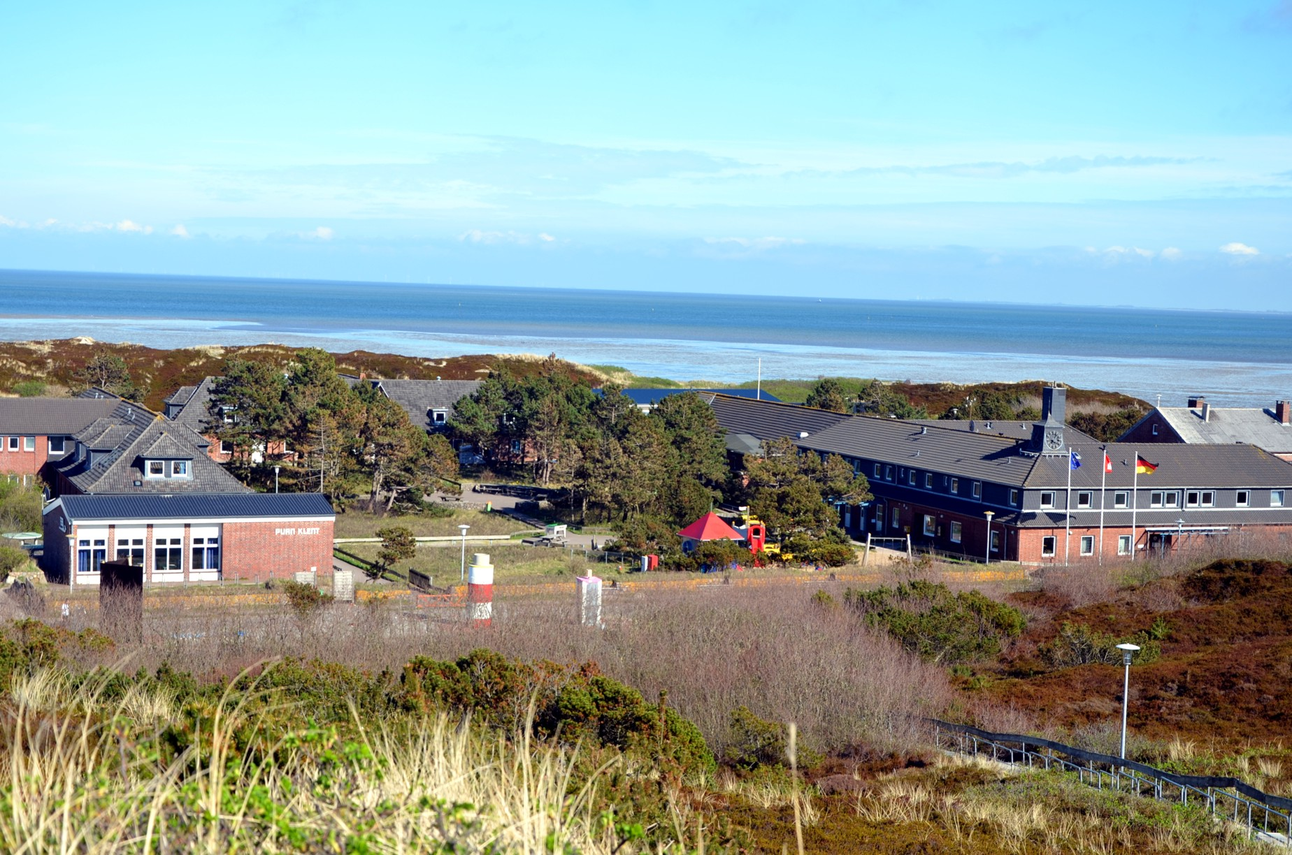 Hamburger Schullandheim Puan Klent auf Sylt